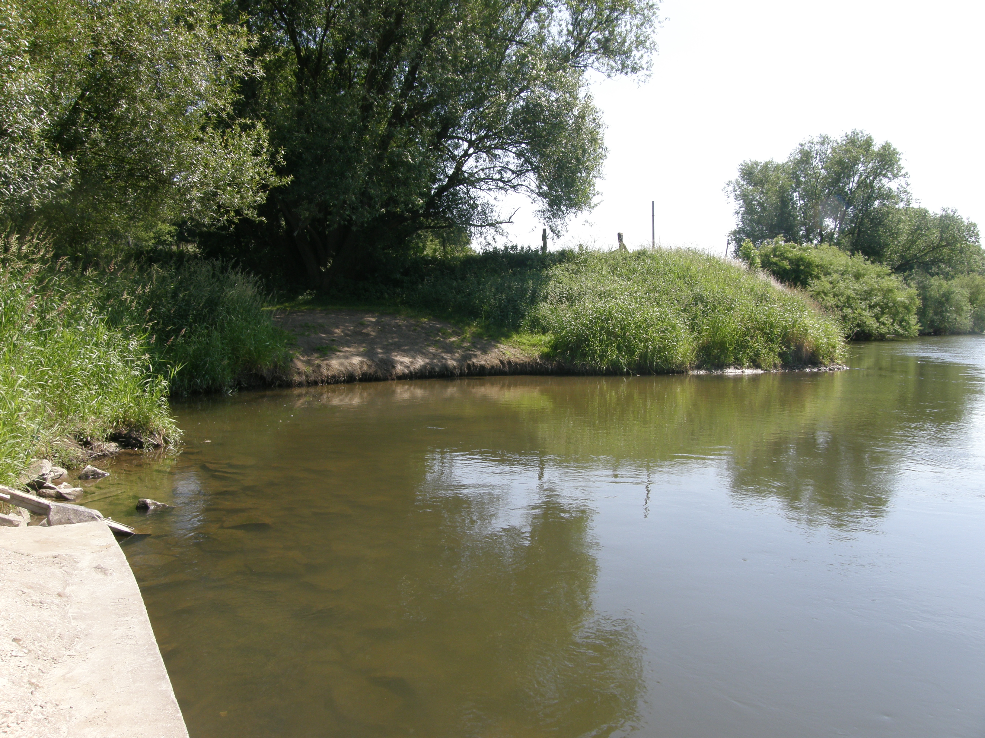 Zugeschüttete Zufahrt zum alten Lippehafen (links hinter den Büschen) in Wesel, hier die Lippe mit der Anlegestelle der Kanuvereine; abgebildeter Bereich im Naturschutzgebiet „Lippeaue“ (NSG WES-092)